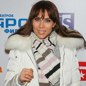 Актриса и певица Юлия Беретта на премьере комедии «Дублёр» 20 декабря 2012 года.